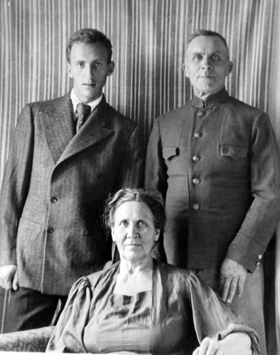 Семья Сметаниных: сын Юрий, отец Алексей Петрович, мать Прасковья Павловна, 1943